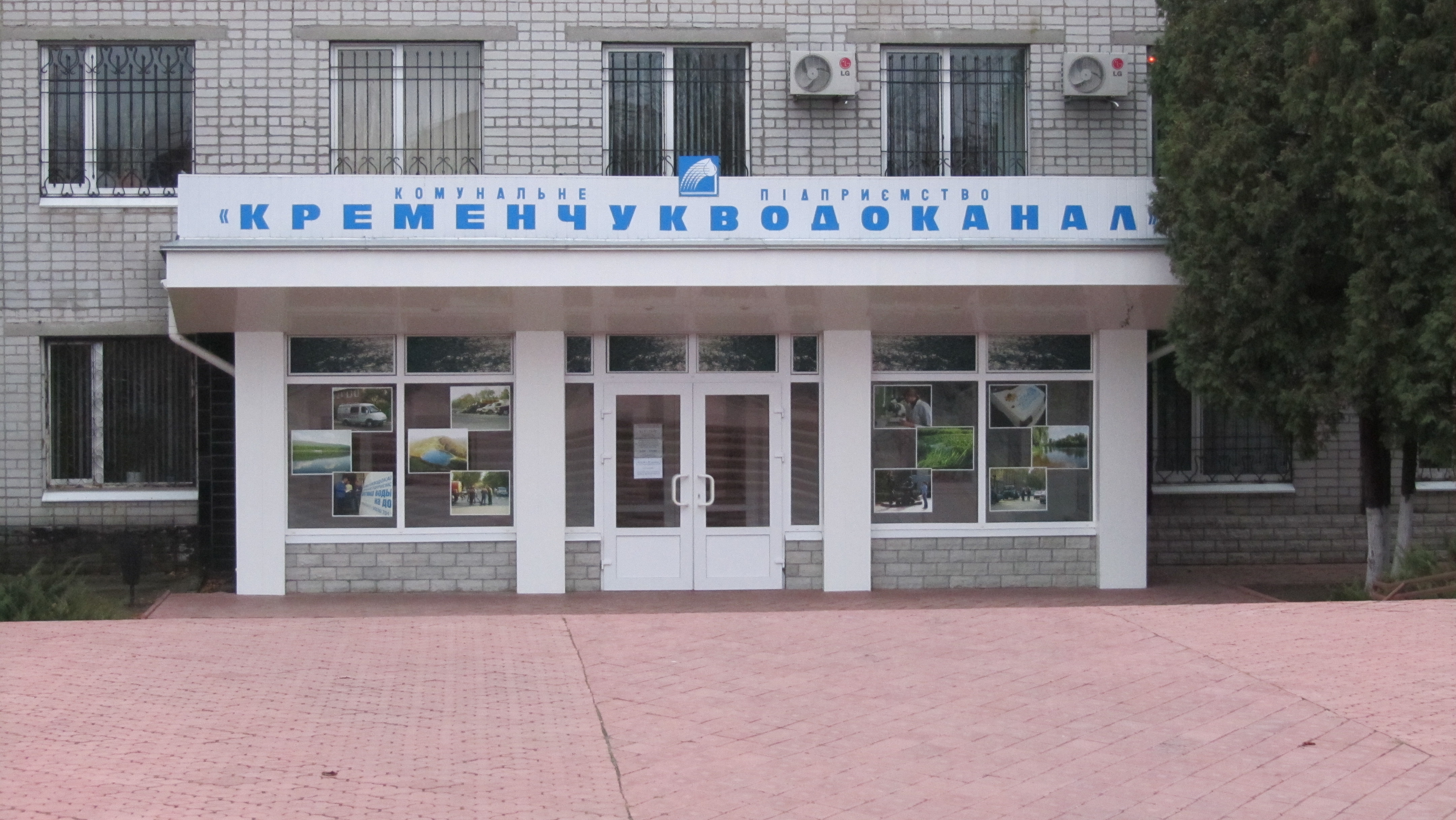 Комунальне підприємство "Кременчуцький водоканал"